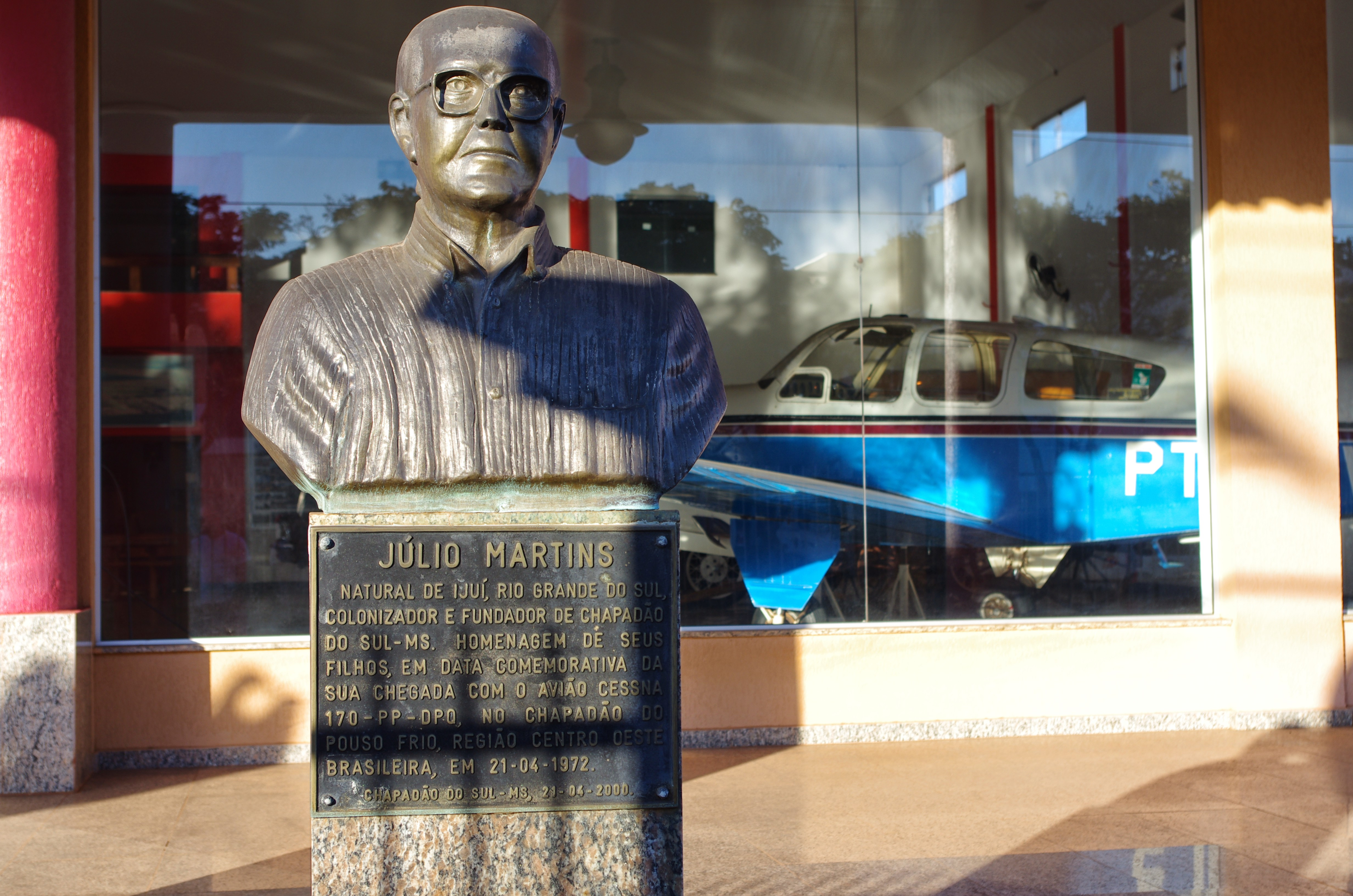 Costa Rica - MS, Brazil